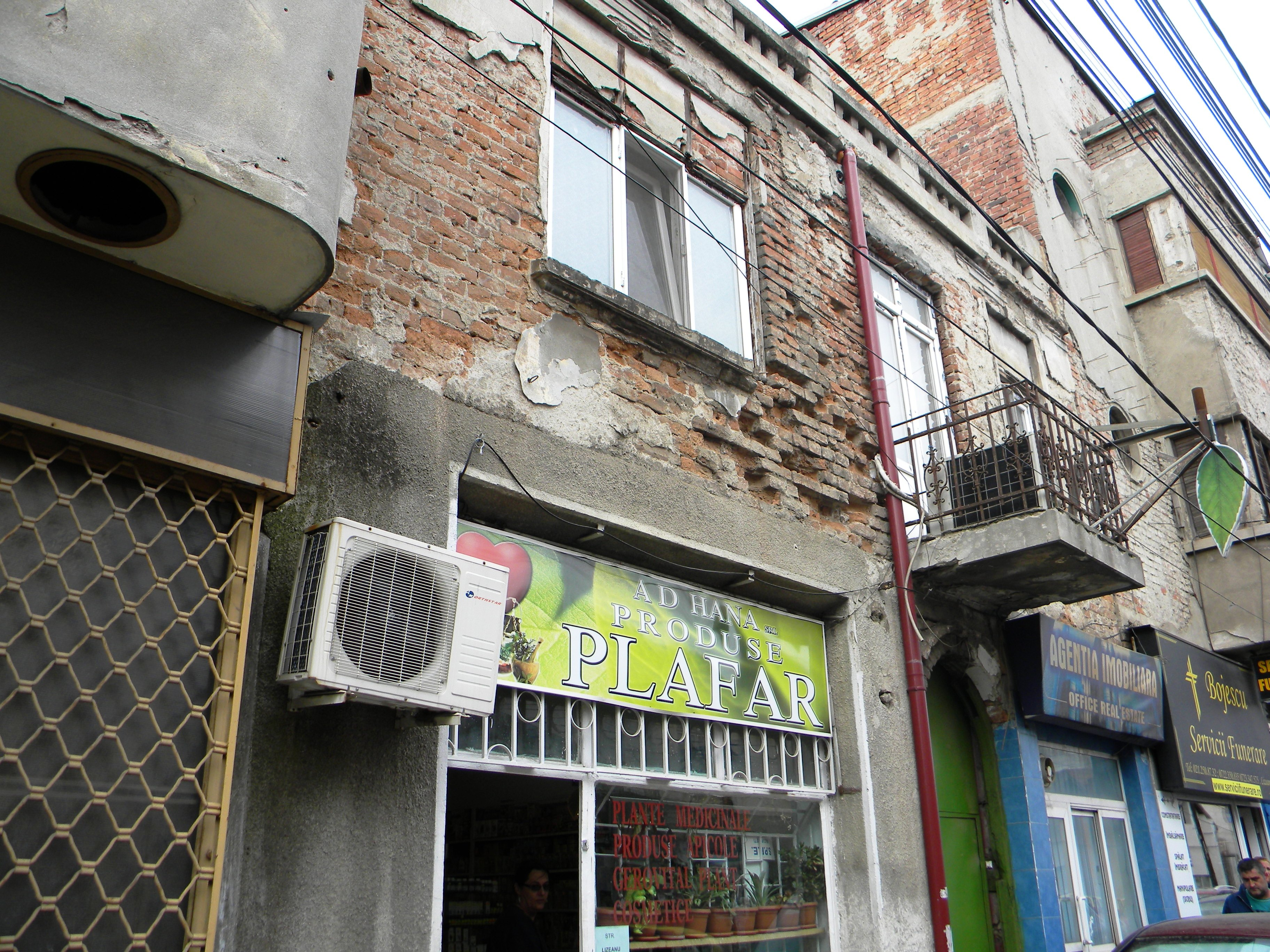 Bucuresti, Romania, Casa pe Str. Lizeanu nr. 21, sect. 2